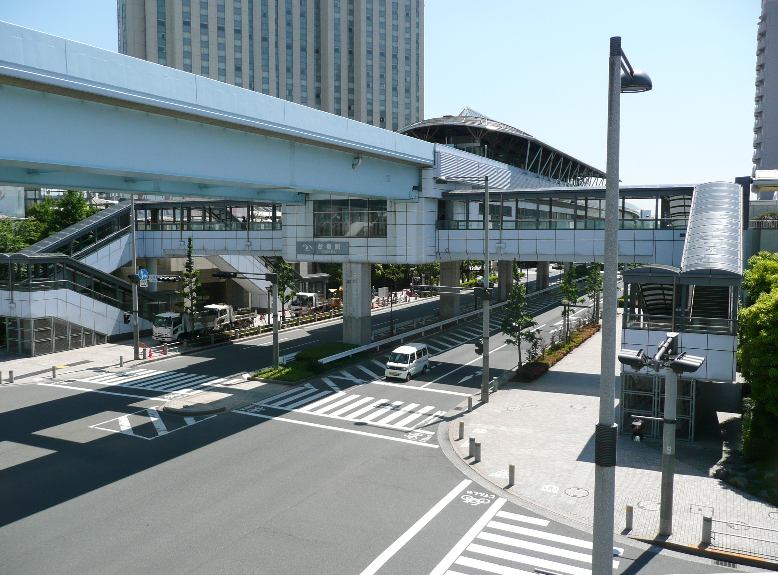 台場駅